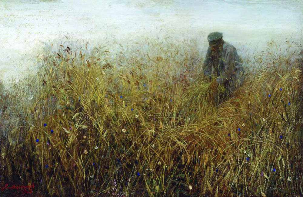 В. М. Максимов. «Залом ржи», 1903. Холст, масло. Николаевский художественный музей им. В.В.Верещагина